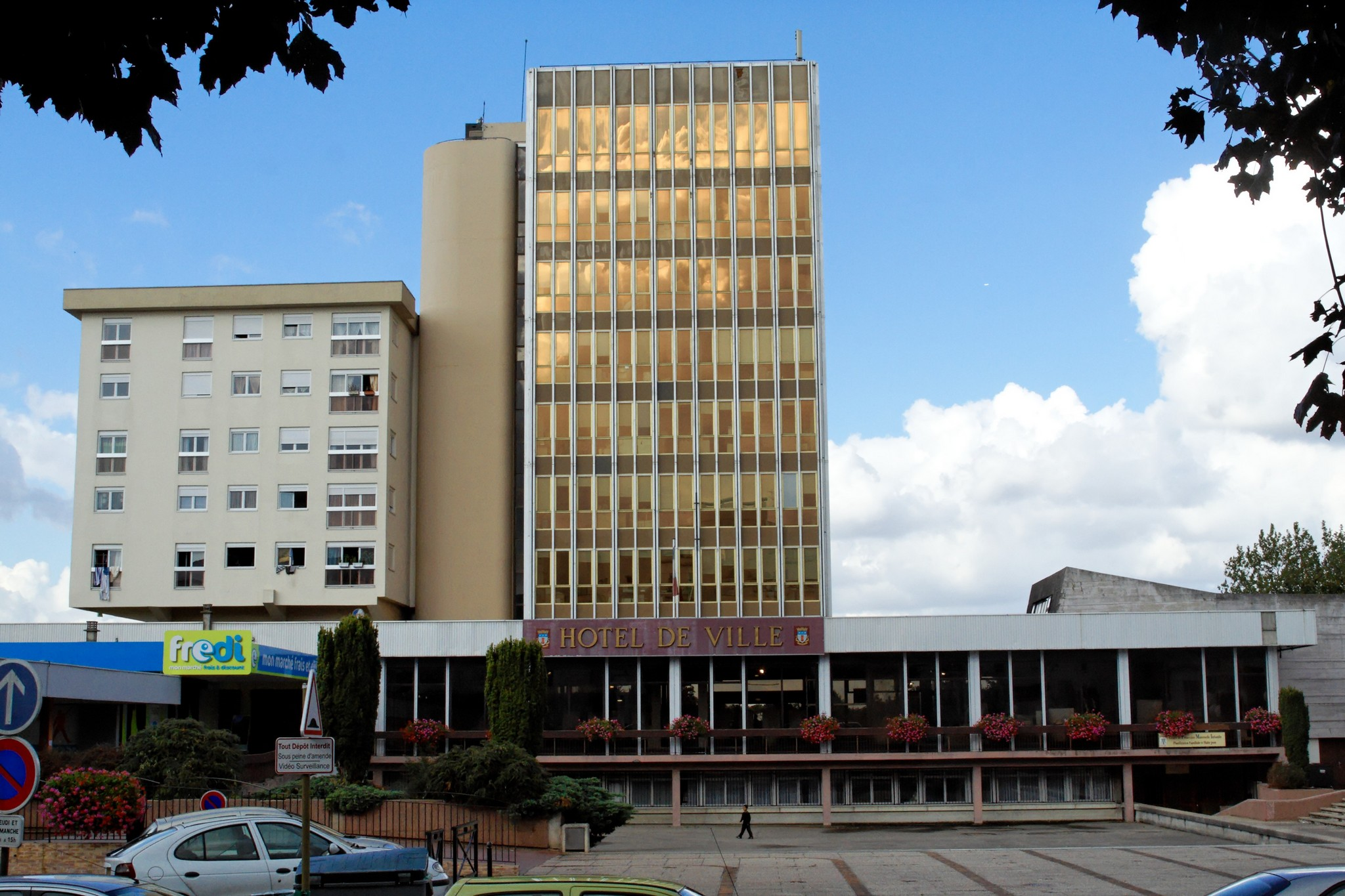 Hotel de Ville de La Queue En Brie (Val de Marne)